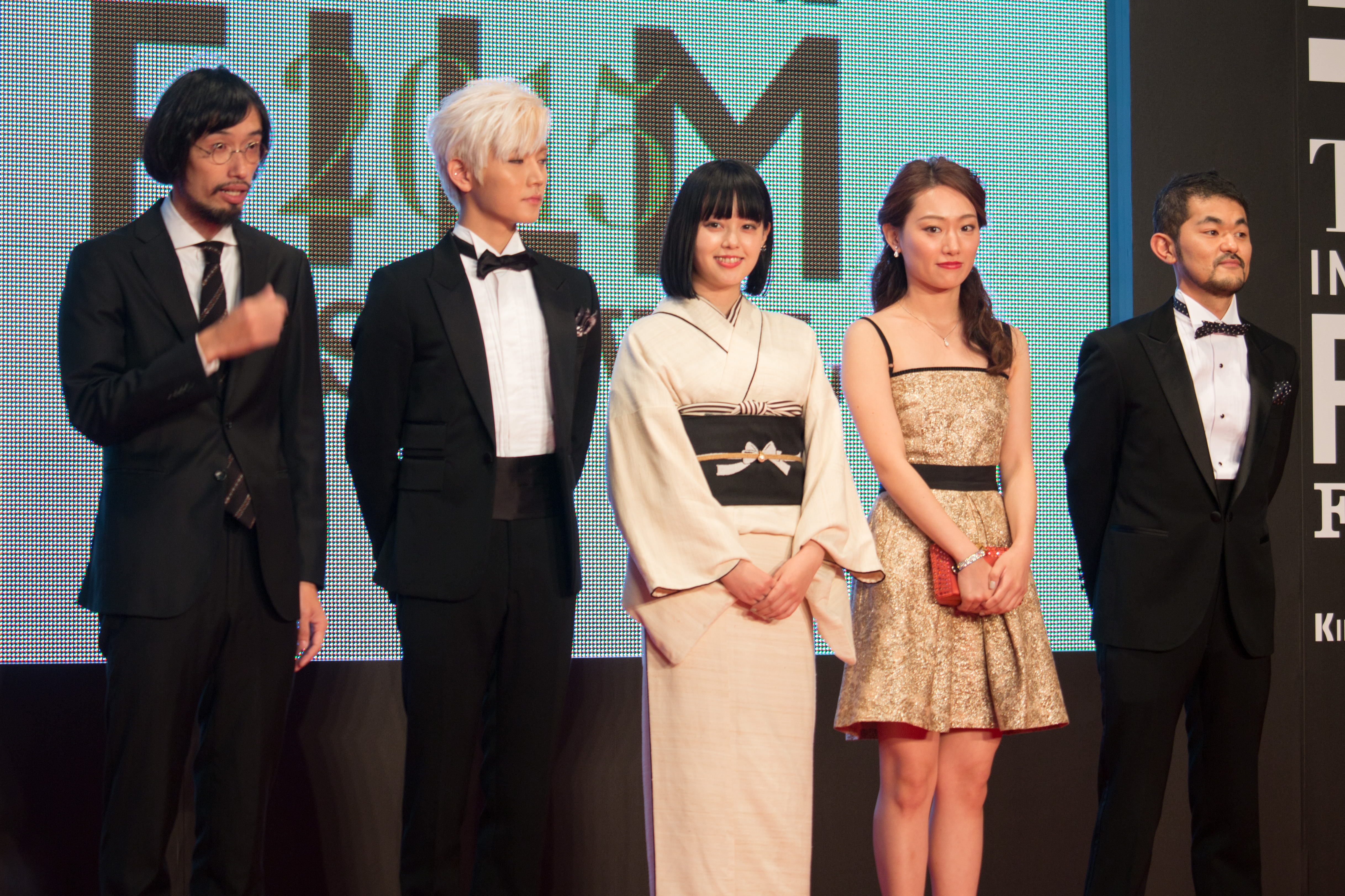 第28回 東京国際映画祭 オープニングセレモニー キャスト クルー (知らない、ふたり)